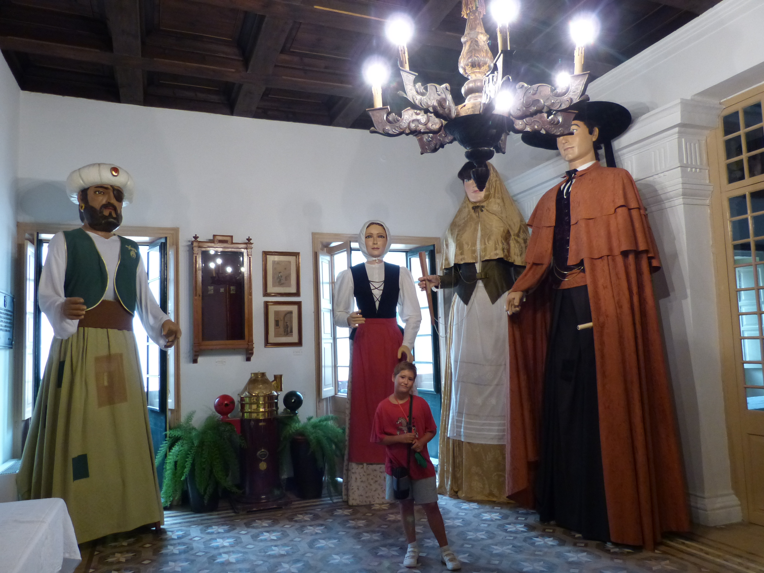 Gigantes en el Ayuntamiento de Mahon This is a photography of a Folklore festival in Spain (Wikidata id Q13258770).